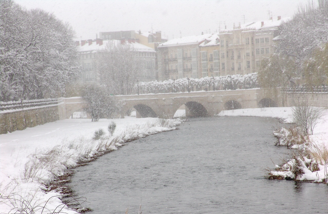 Rio Arlanzón, nevada 2007, al fondo puente de Santa María, Burgos, España.